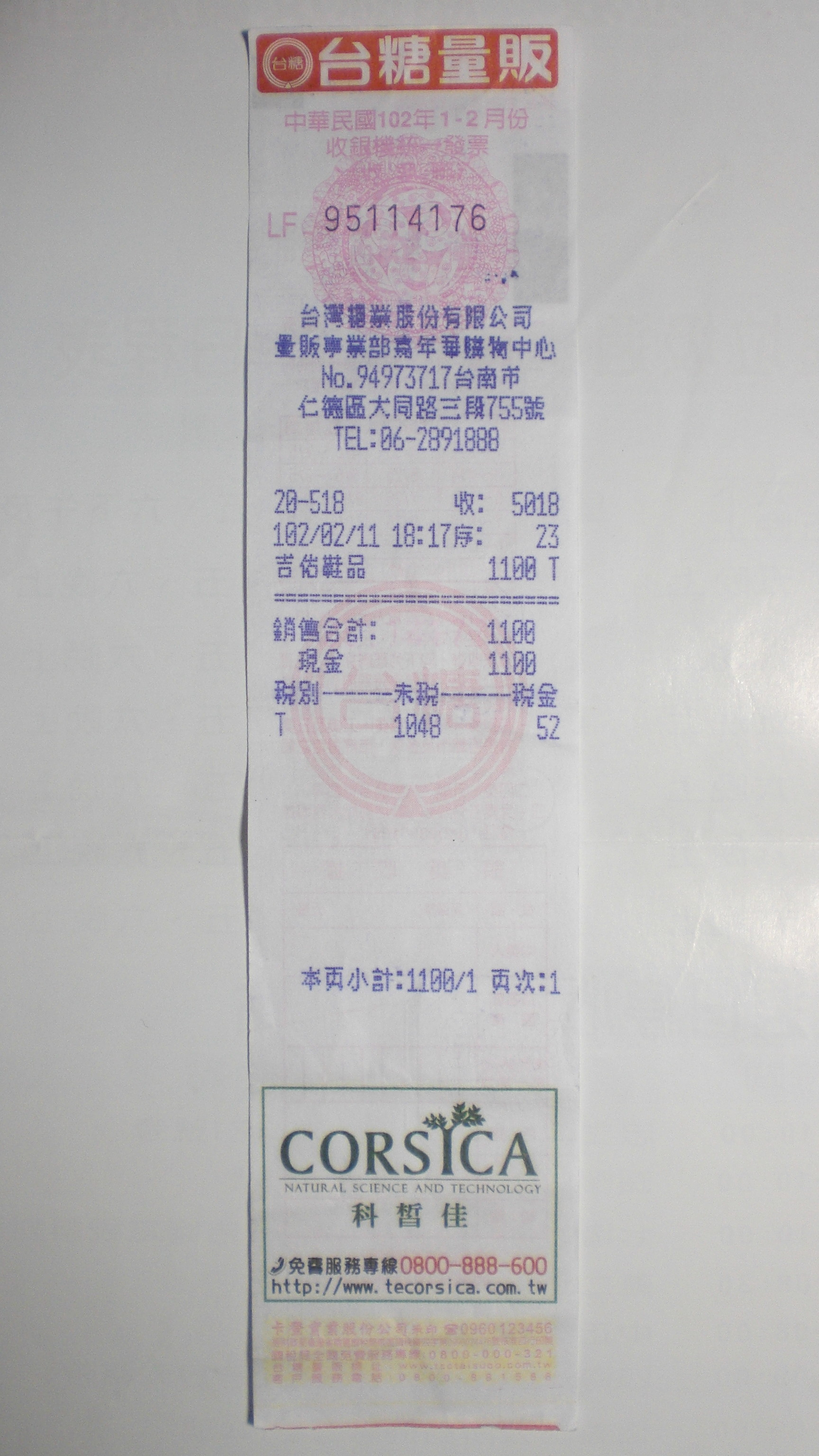 中文（台灣）: 台灣糖業公司量販事業部嘉年華購物中心於2013年2月11日開立的收銀機統一發票收執聯正面